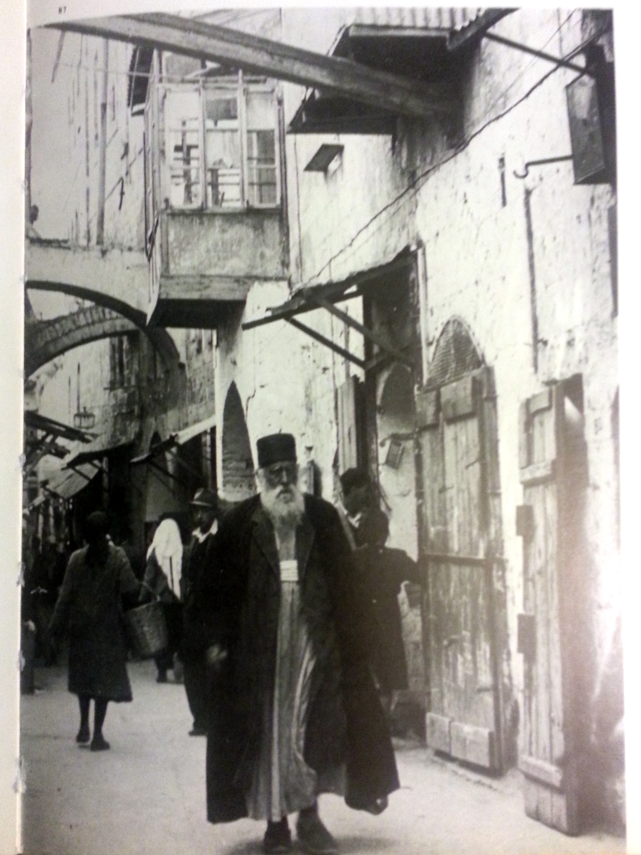 רחוב היהודים ברובע היהודי